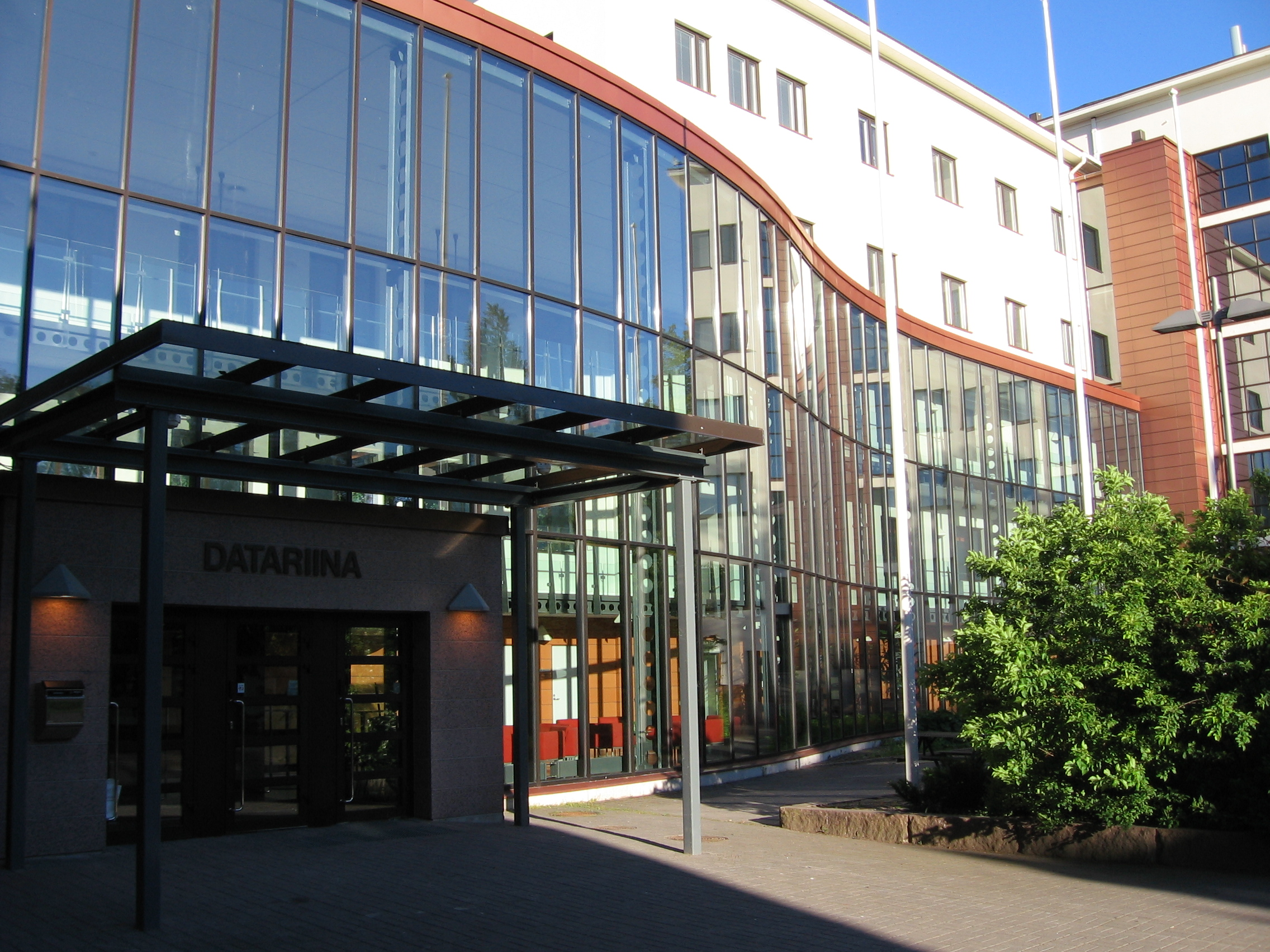 Datariinan yrityskeskus Kotkassa. Keskus toimii entisessä koulurakennuksessa, jota on laajennettu moderneilla lisäosilla.